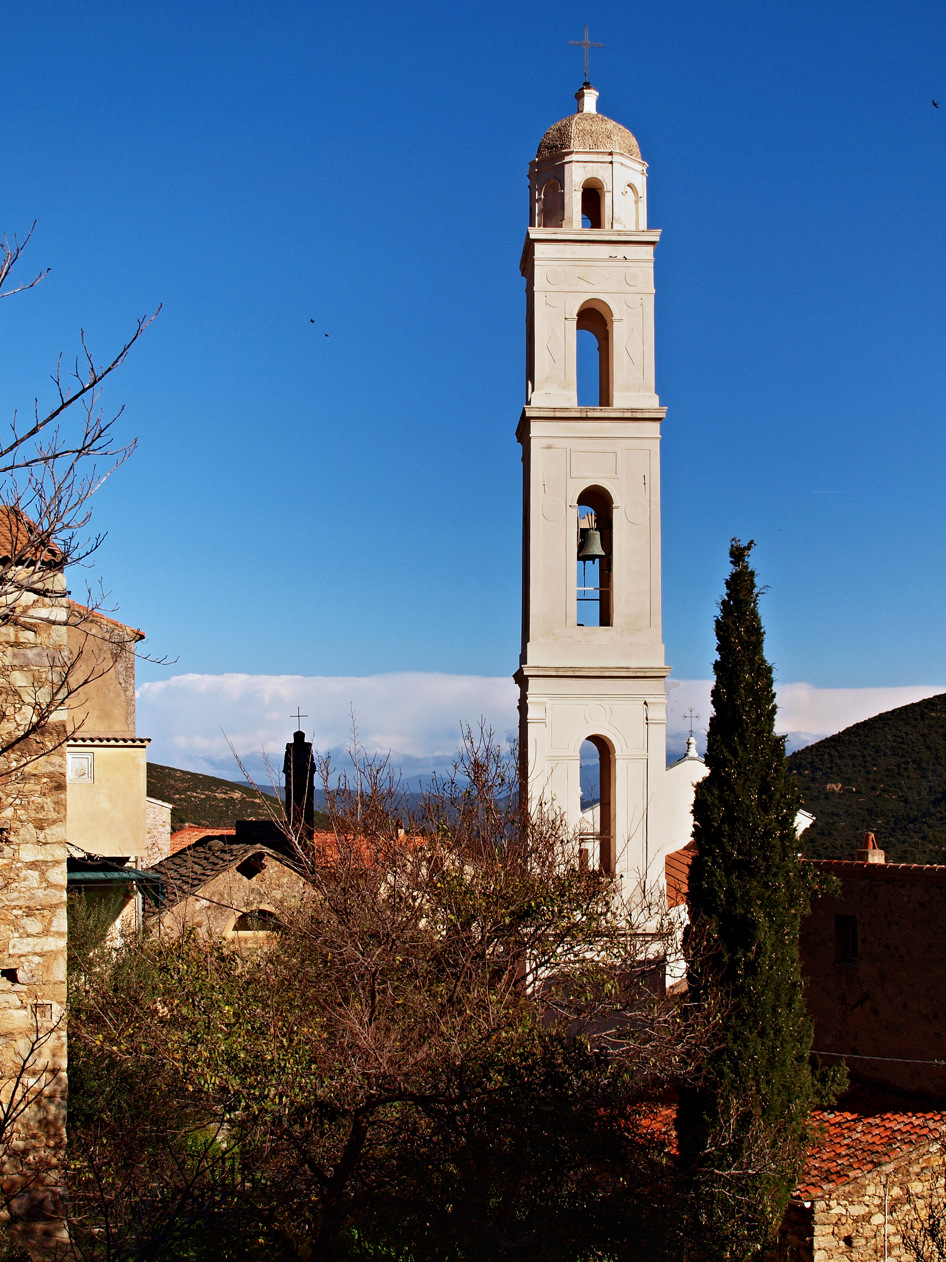 Palasca, Balagne (Haute-Corse) - Église de l'Assomption (Santa Maria Assunta).